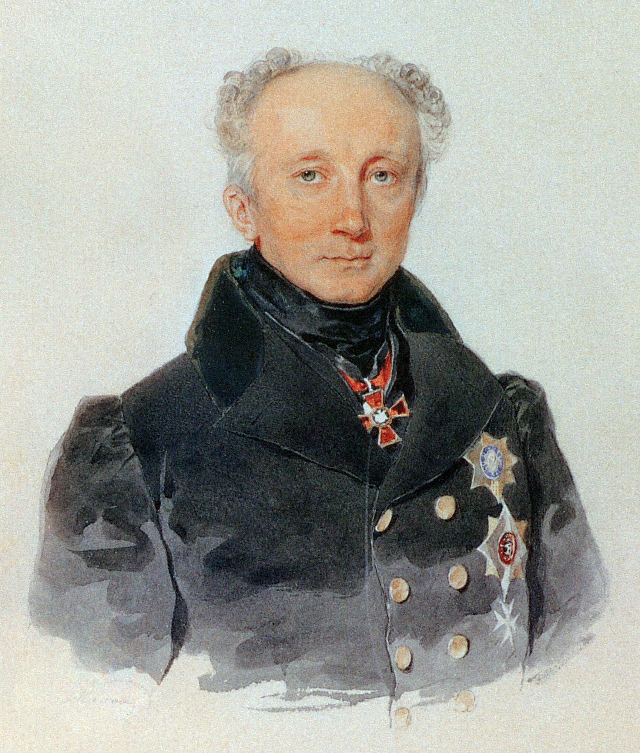 Граф Павел Иванович Тизенгаузен (1774-1864), сын графа Ивана Андреевича Тизенгаузена (1741-1815). Его младший брат Фёдор был женат на дочери М.И.Кутузова.